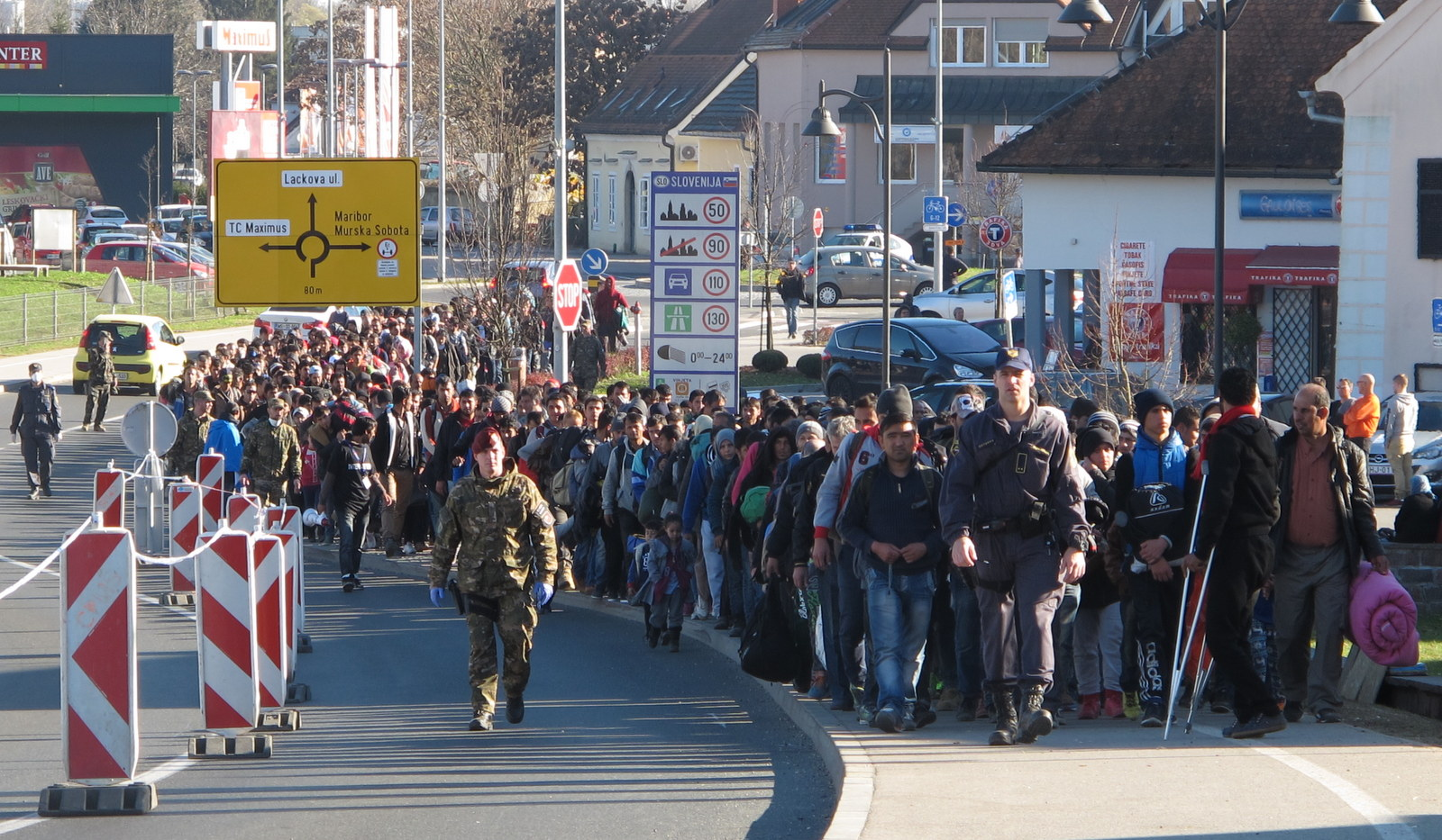 Slovenska vojska spremlja begunce do mejnega prehoda za mednarodni promet Gornja Radgona. Ministrica obiskala pripadnike Slovenske vojske in URSZR, ki pomagajo v nastanitvenem centru in na meji.